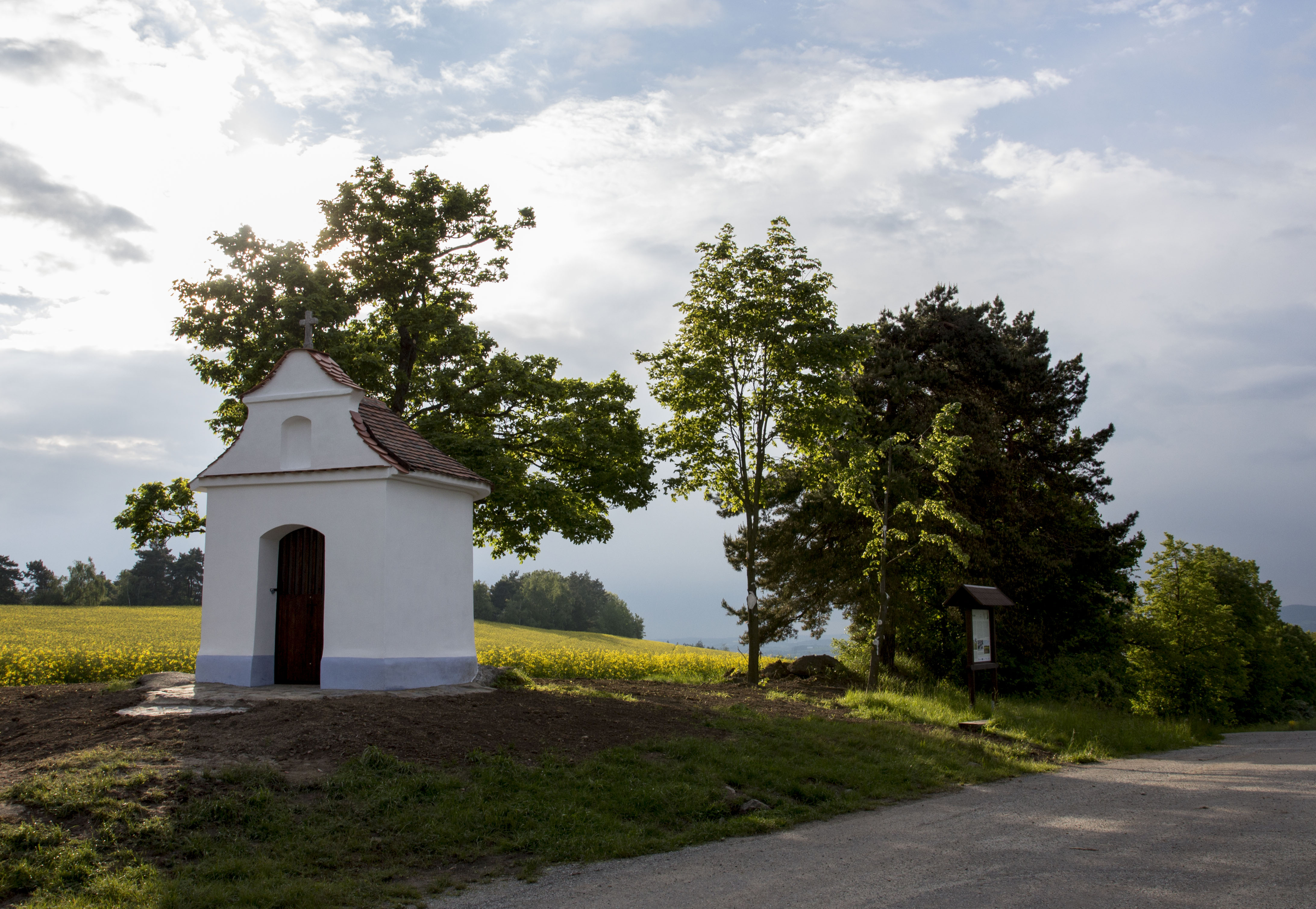 Kaplička tzv. Štěpánkova (Křečkova), za vsí, Hrbov